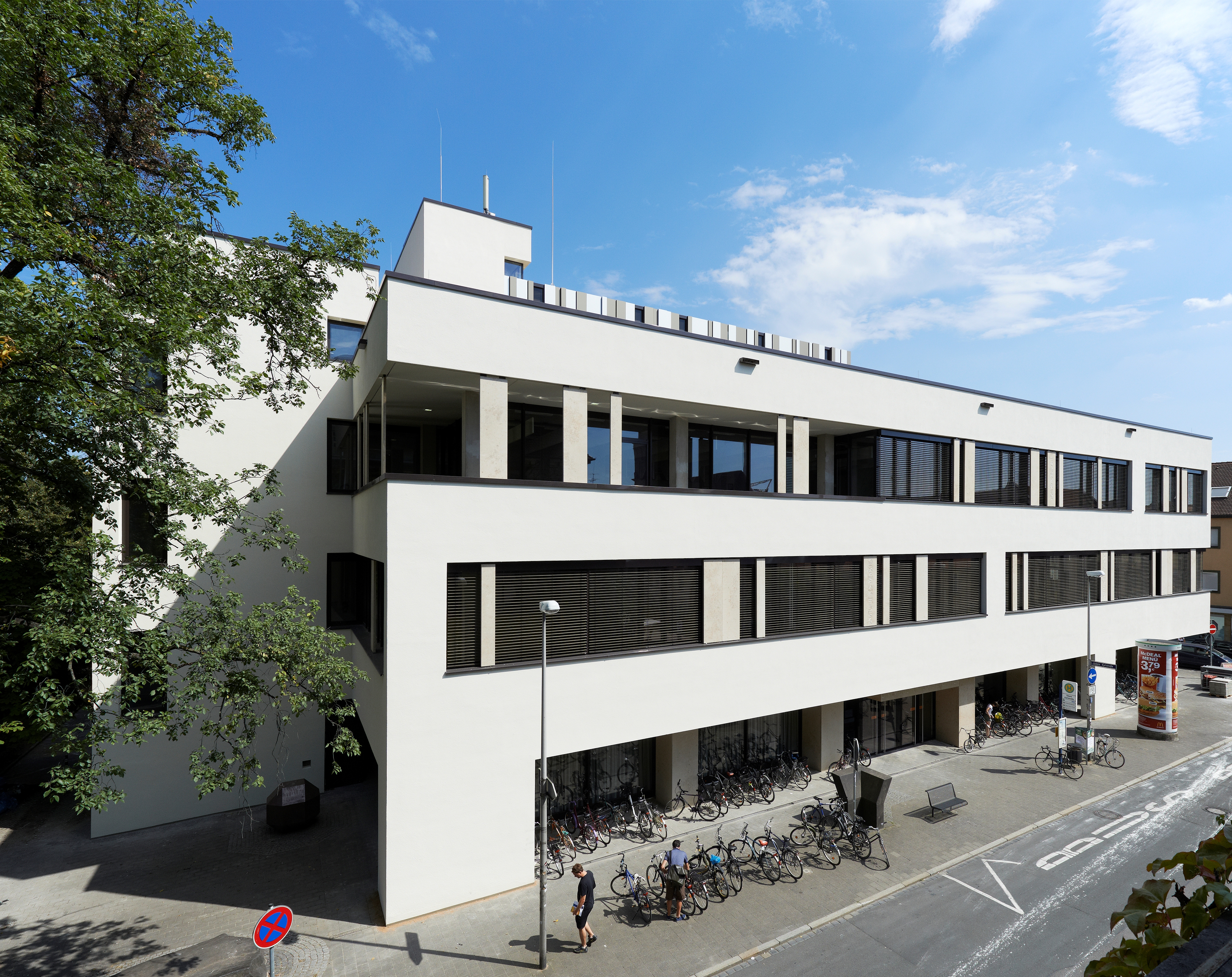 Hauptbibliothek der Friedrich Alexander Universität Erlangen Nürnberg, Neubau